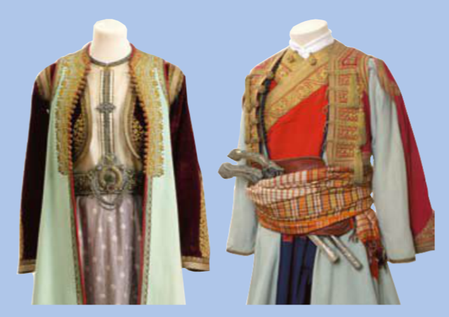 Srpski (latinica): Crnogorska ženska i muška nošnja